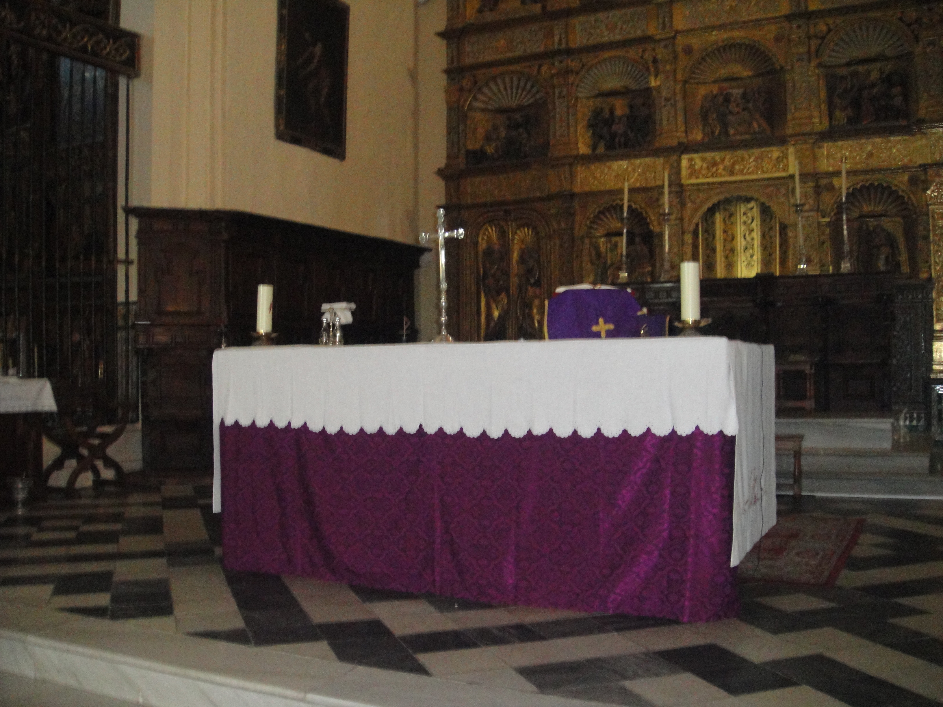 Altar mayor y presbiterio de la iglesia de Nuestra Señora del Castillo de Fuente Obejuna, provincia de Córdoba, (España).